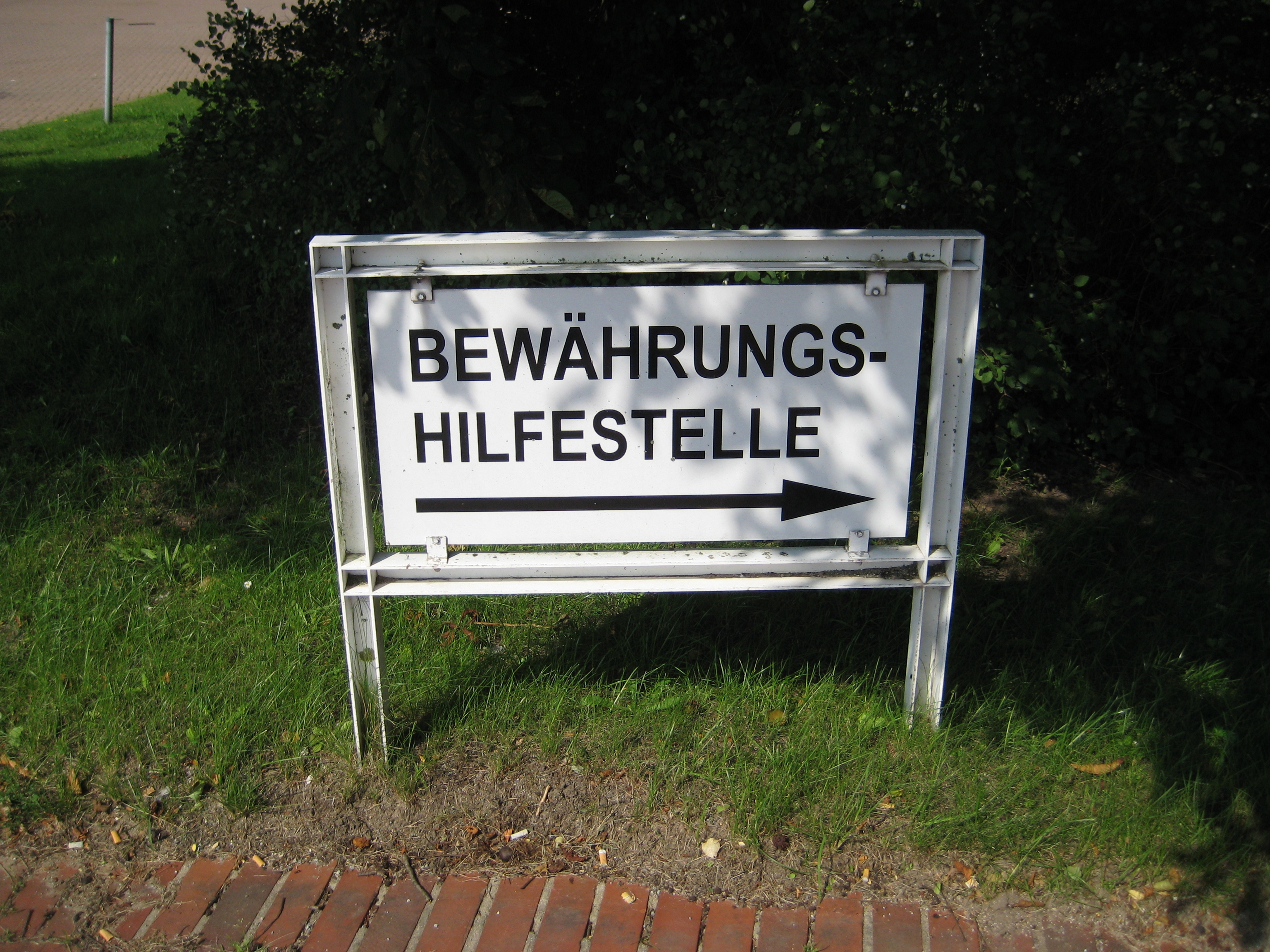 Itzehoe Bewährungshilfestelle Hinweisschild am Landgericht